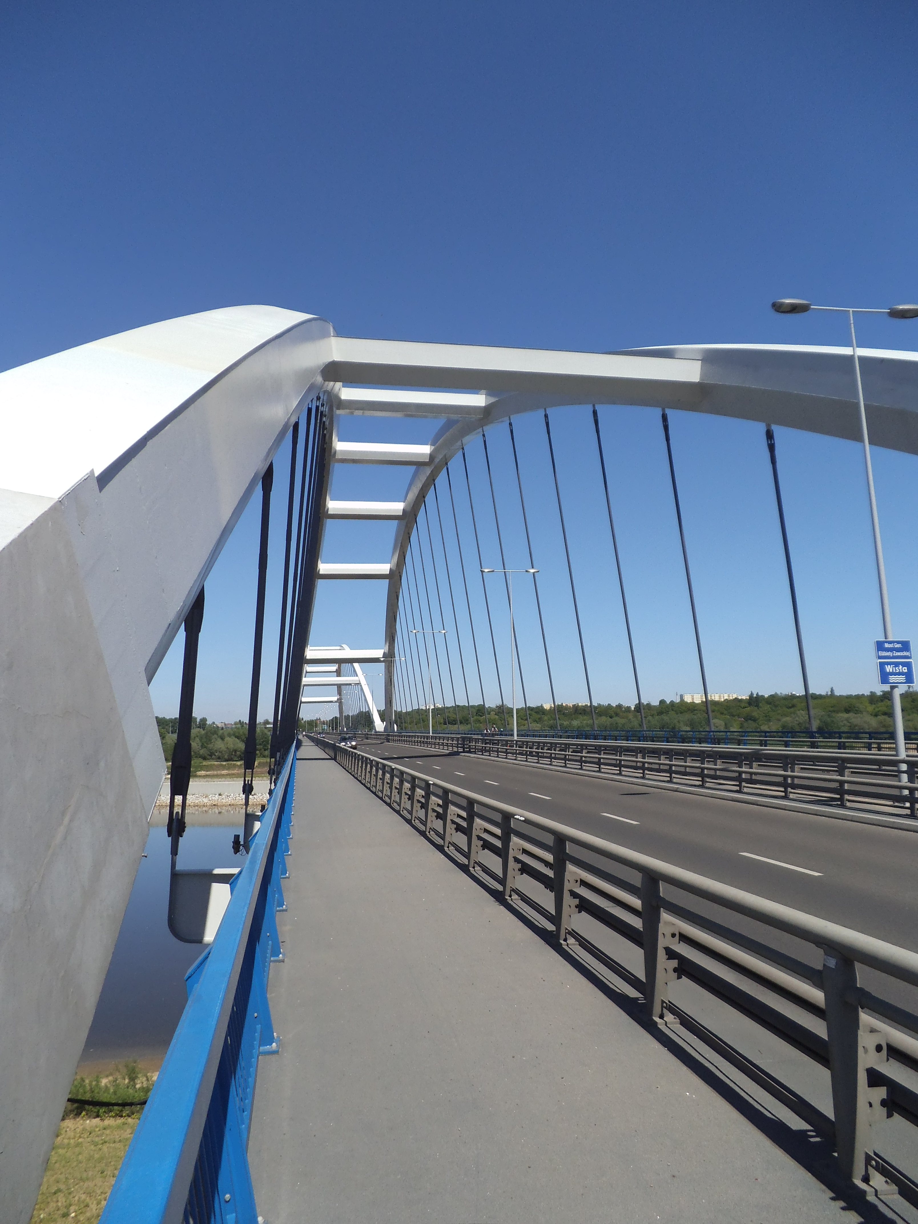 Most im gen. Elżbiety Zawackiej w Toruniu